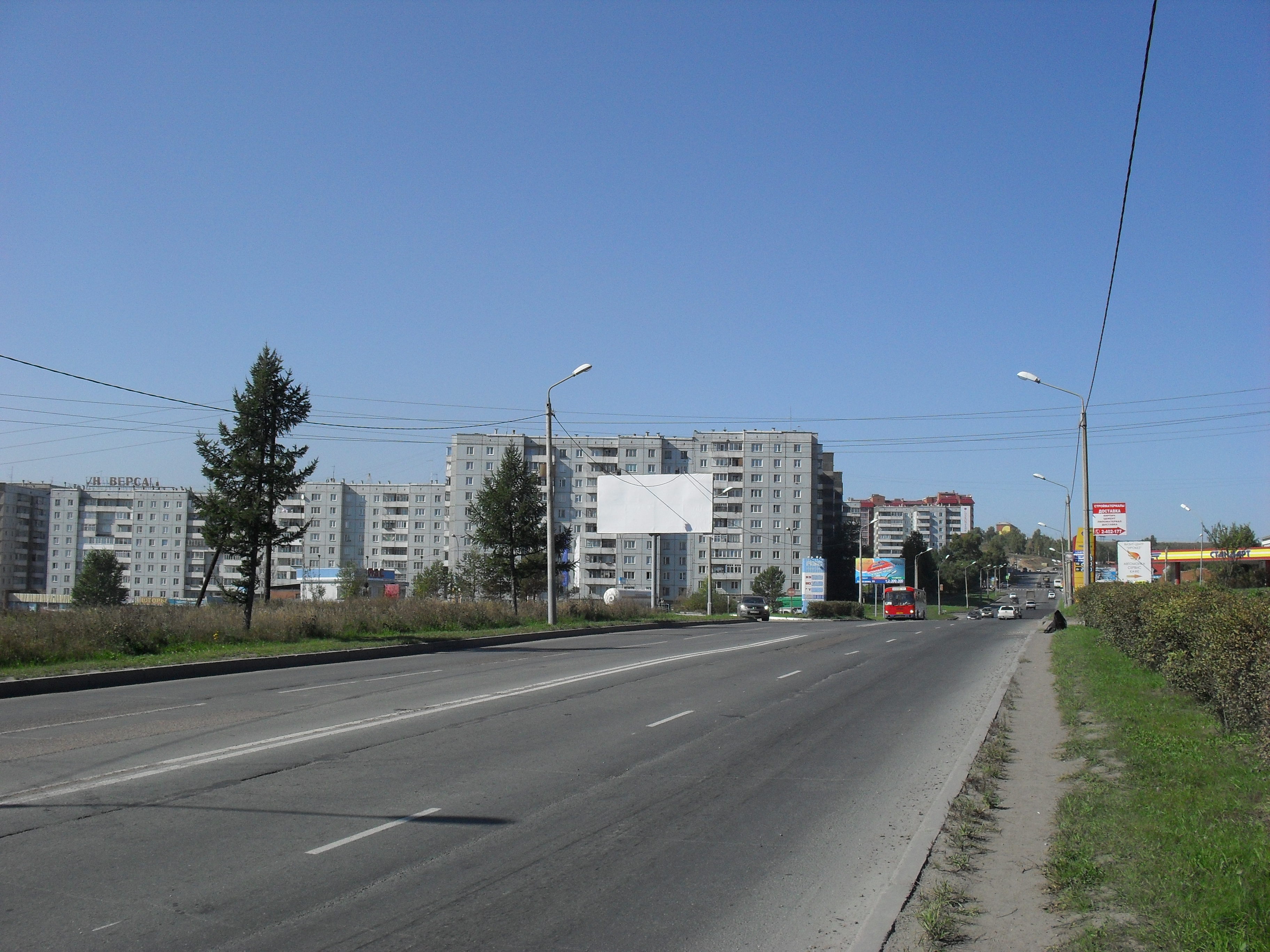 Улица Славы, микрорайон Солнечный, Красноярск